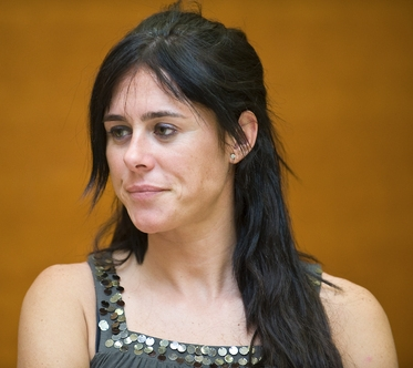 Edurne Pasaban, Donostiako Kursaal jauregian egindako hitzaldi batean